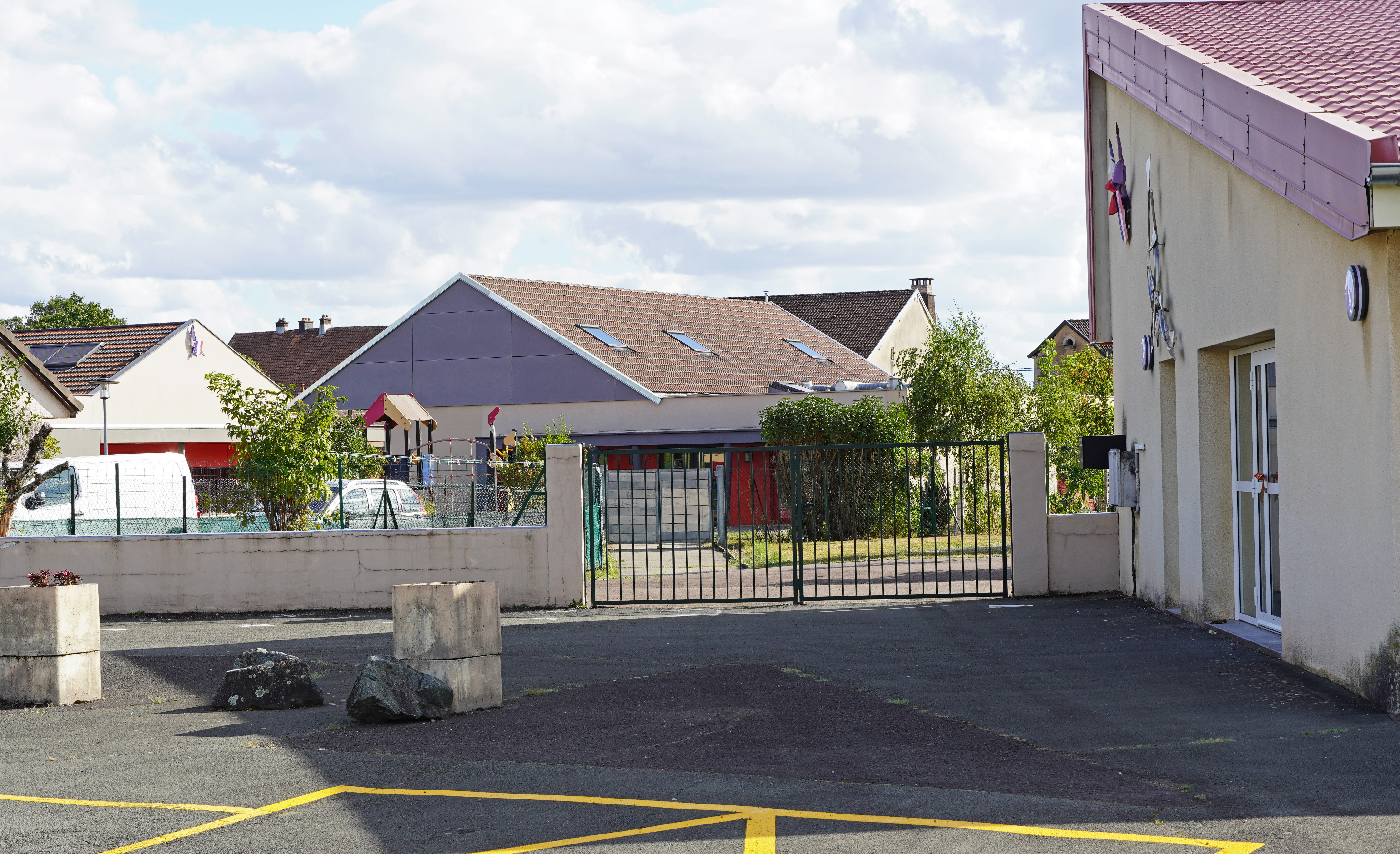 L'école de Saint-Germain (Haute-Saône).